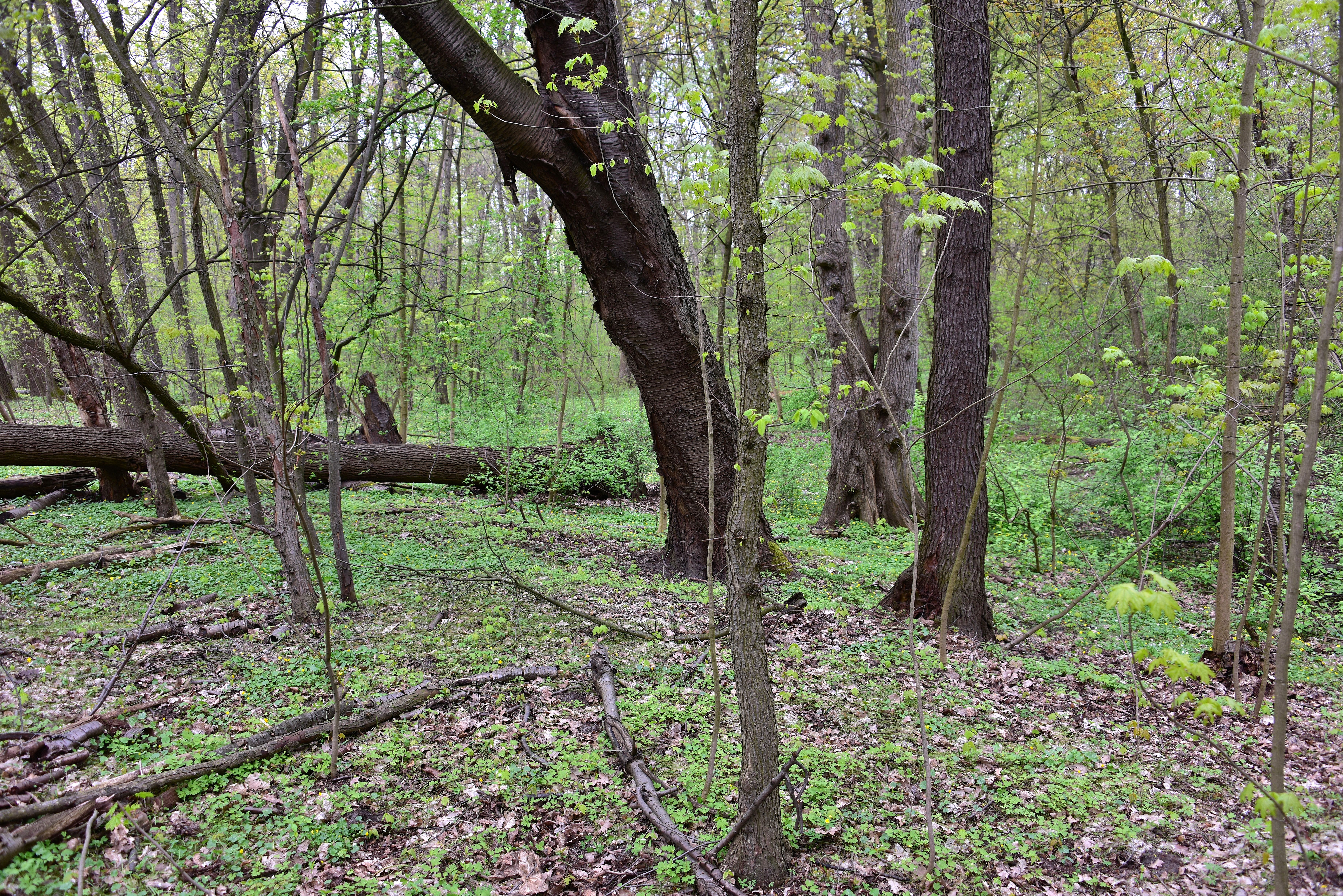 Łęg wiązowo-jesionowy w rezerwacie Las Bielański w Warszawie